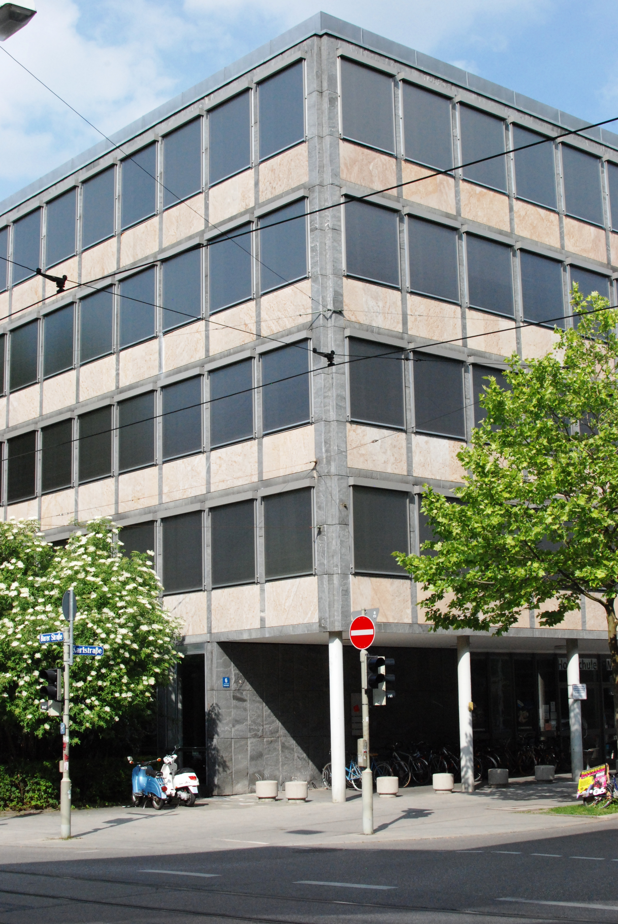 Südwestecke der ehemaligen Staatsbauschule München, jetzt "Campus Karlstraße" der Hochschule für angewandte Wissenschaften an der Karlstraße/Barerstraße im Stadtteil Maxvorstadt, München, Regierungsbezirk Oberbayern, Bayern. Als Baudenkmal unter Aktennummer D-1-62-000-7830 in der Bayerischen Denkmalliste aufgeführt. Erbaut 1954 bis 1957 von der Architektengemeinschaft Franz Ruf, Adolf Seifert und Rolf ter Haerst.